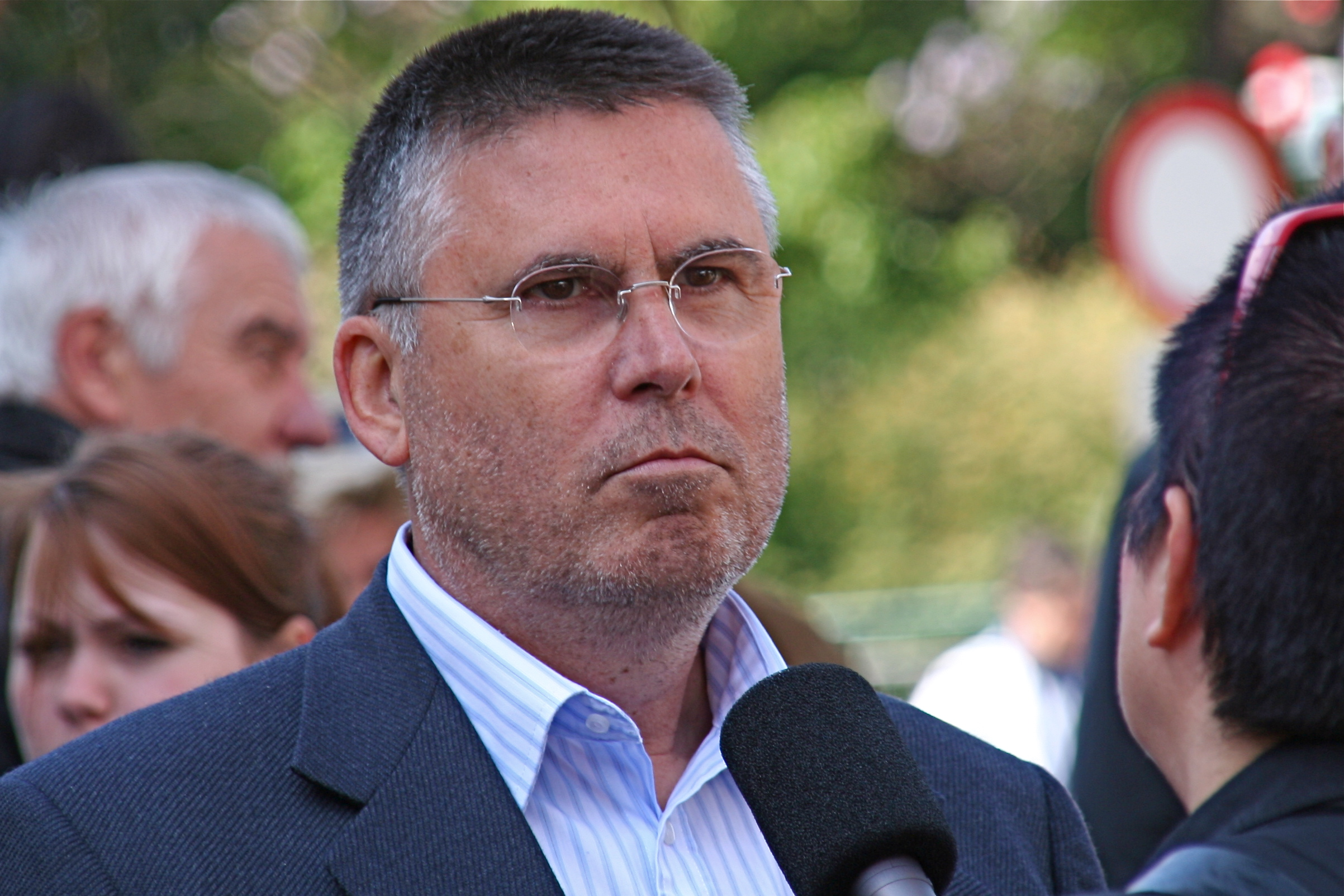 Josef Broukal bei einem Interview bei der 1. Mai-Feier 2007.